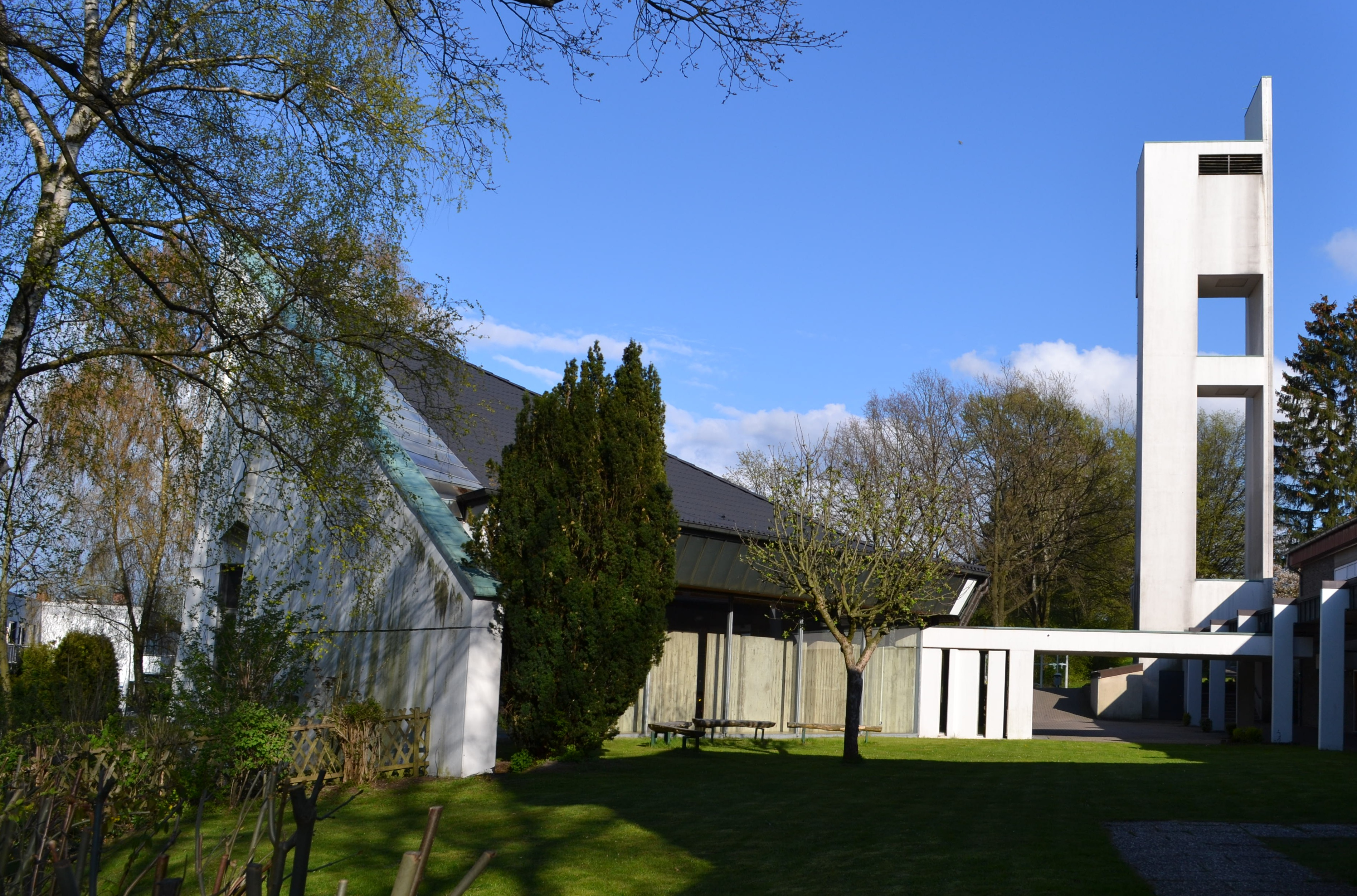 Evangelisch-reformierte Versöhnungskirche, Detmold, Martin-Luther-Straße 39